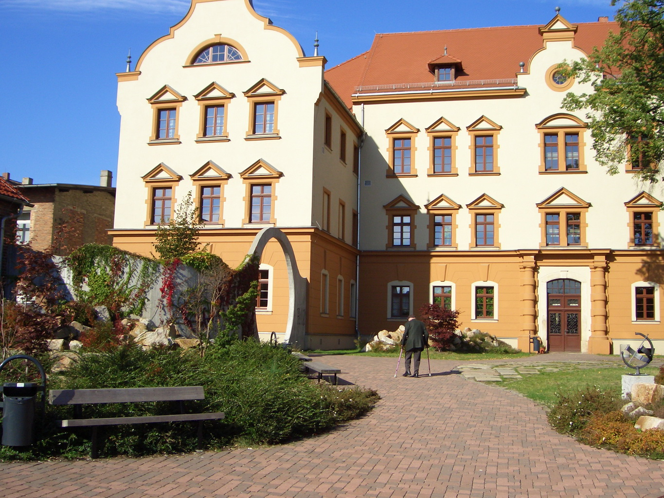 Friedrich-Schleiermacher-Gymnasium Niesky